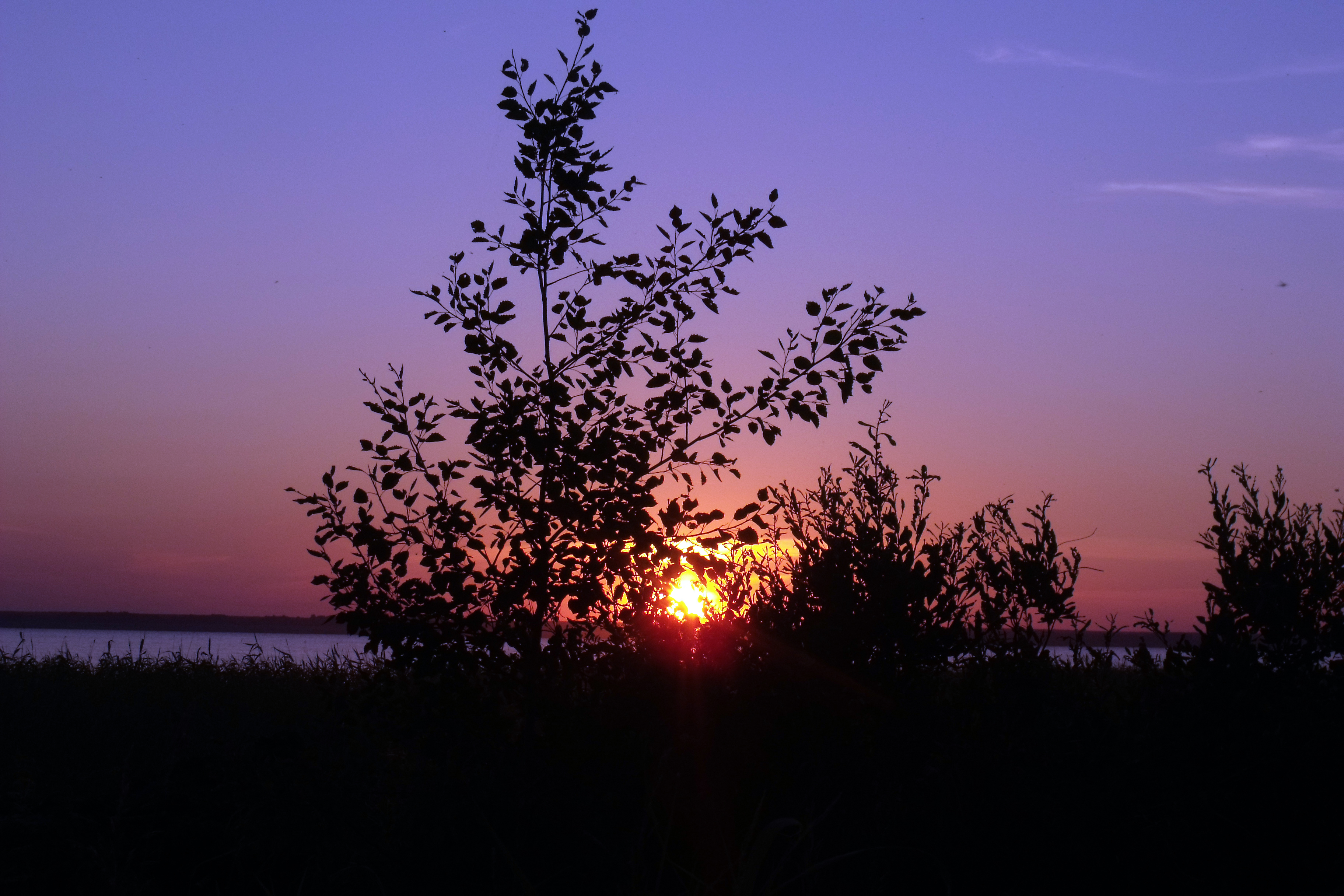 закат на озере шаблиш